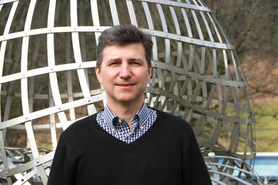 Foto di Michael Drmota